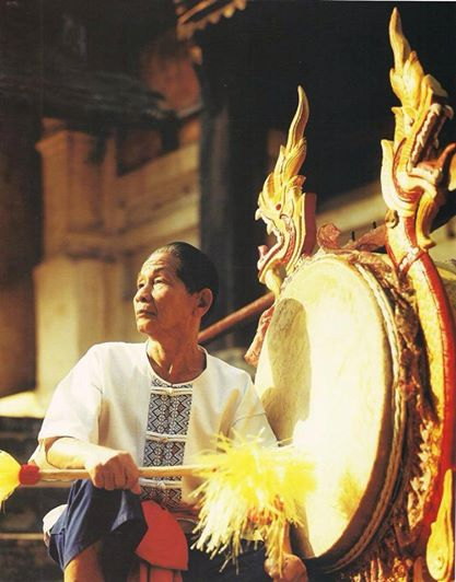 ศิลปินแห่งชาติสาขาศิลปะการแสดง (การแสดงพื้นบ้าน-ช่างฟ้อน)ปี 2535